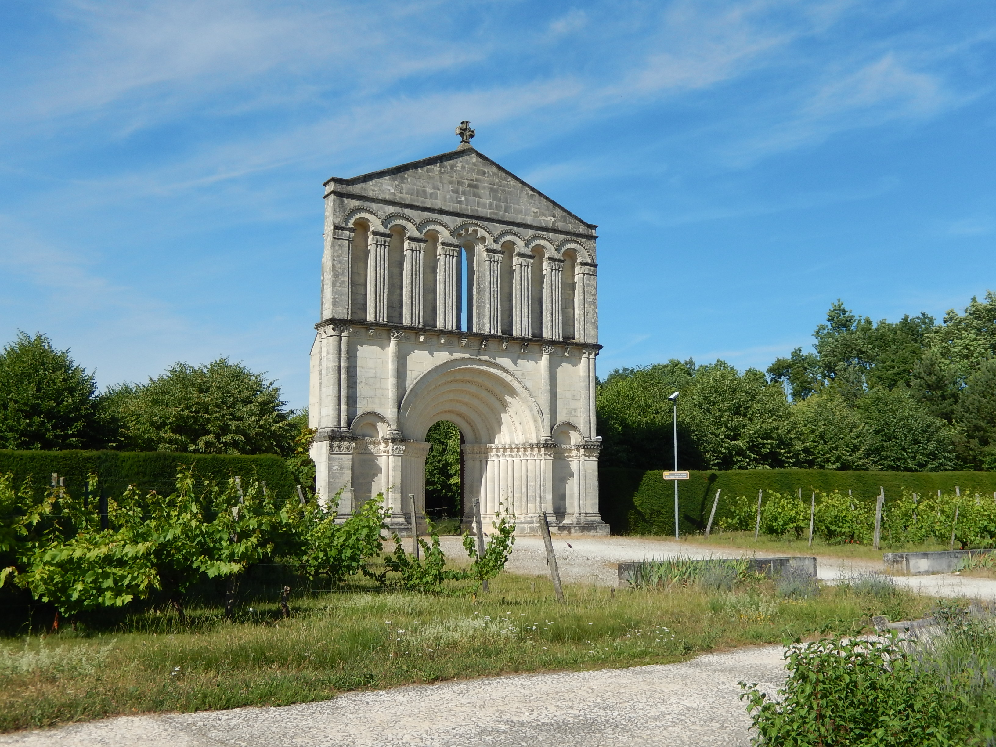 L'entrée du jardin de sculpture romane de Lozay, par l'aire de repos de Lozay située sur l'autoroute A10.